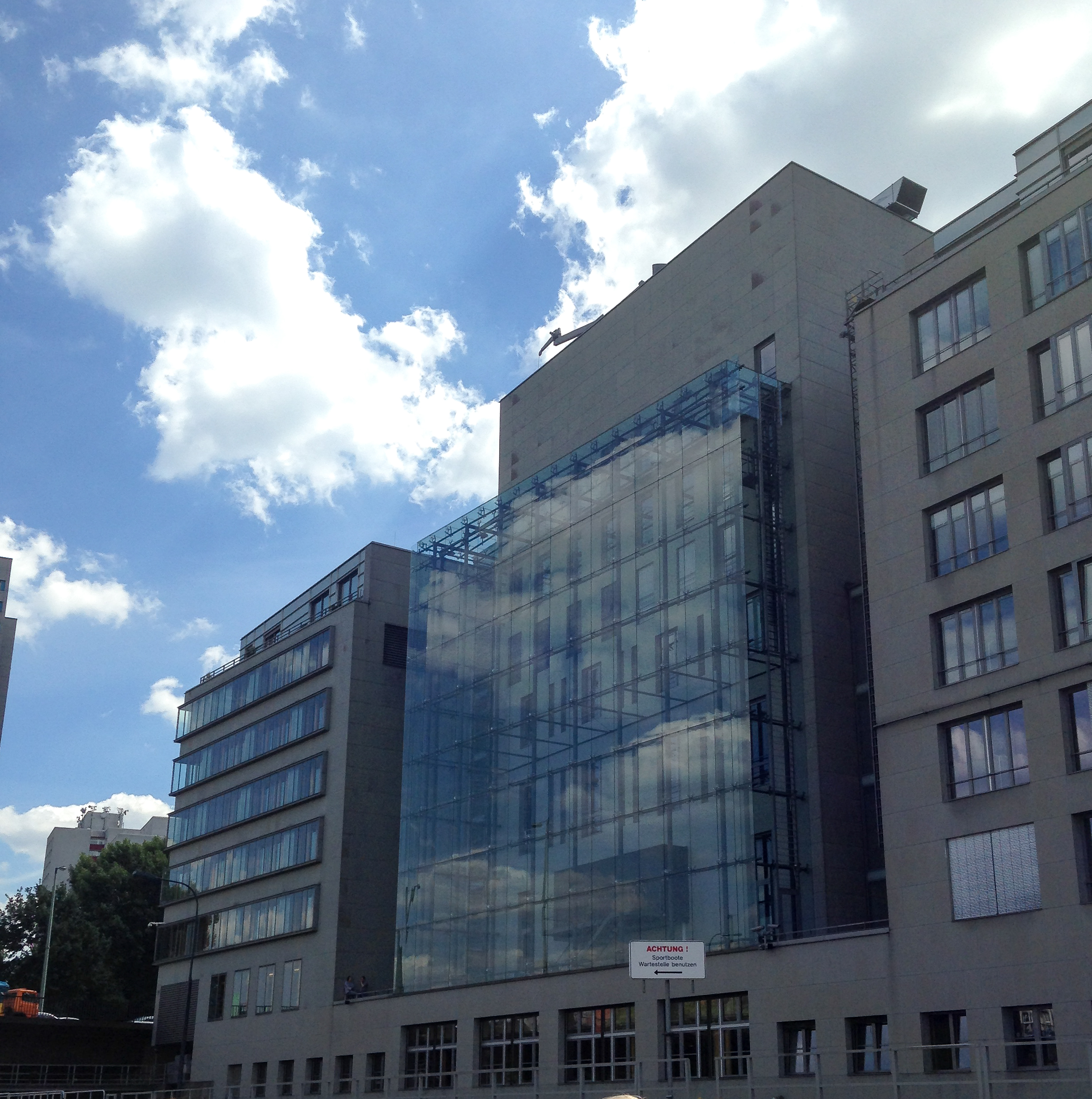 Nordfassade des Hauses der Deutschen Wirtschaft von einem Spreeschiff aus, Berlin.